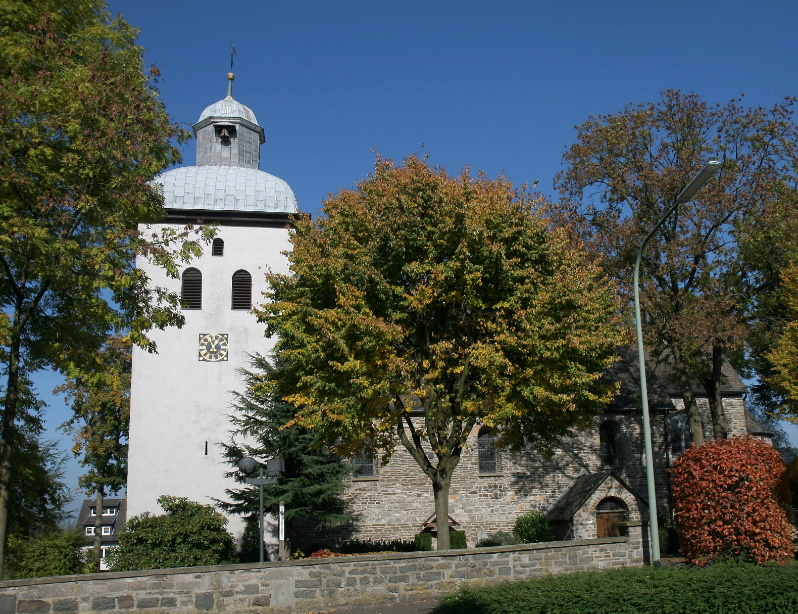 Katholische Pfarrkirche St. Lambertus in Neuenrade-Affeln. Spätromanische Hallenkirche, erbaut Mitte des 13. Jahrhunderts.